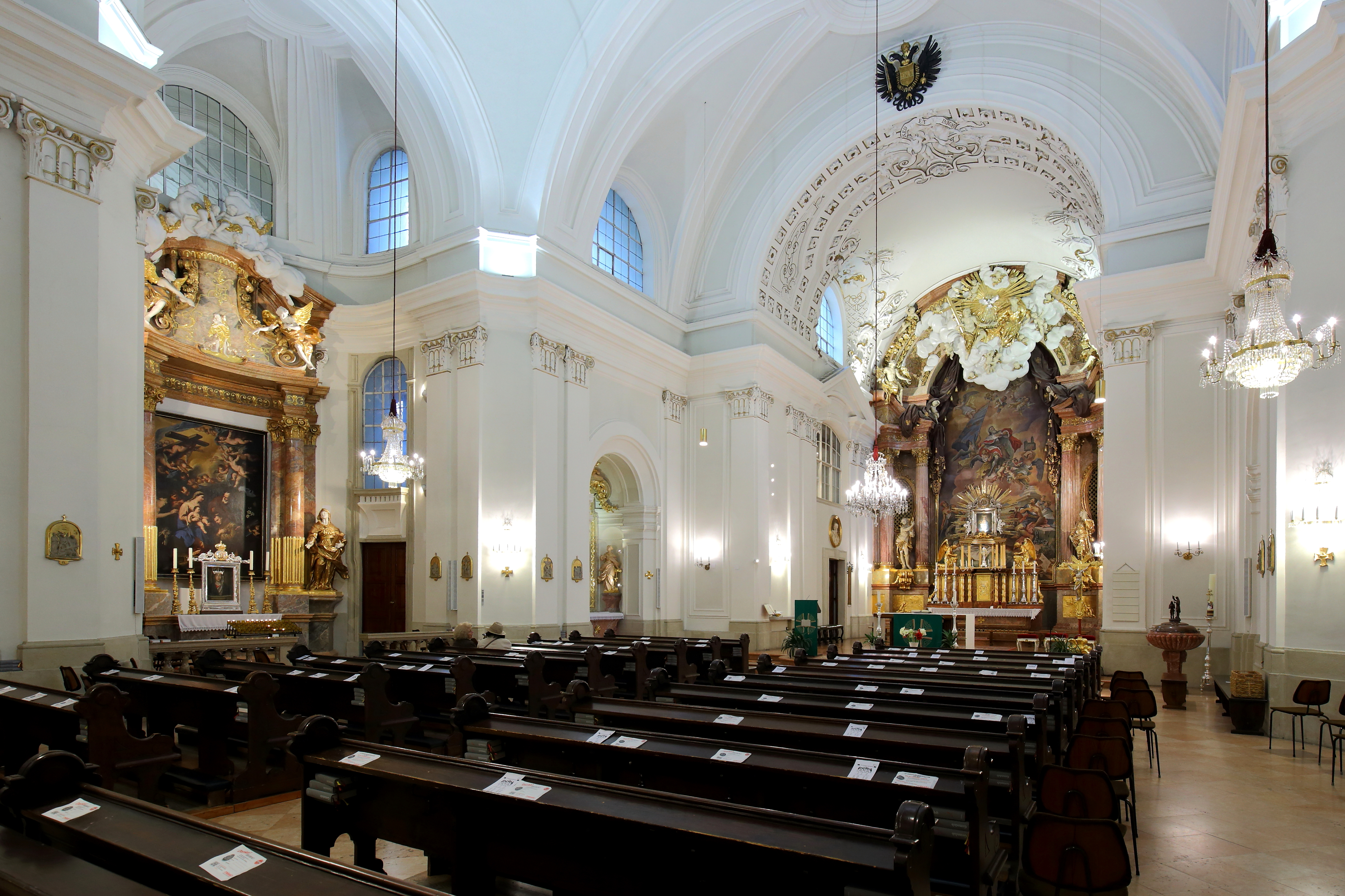 Innenansicht der Leopoldskirche im 2. Wiener Gemeindebezirk Leopoldstadt. Den Grundstein zur Kirche legte Kaiser Leopold I. im Jahr 1670. Von 1722 bis 1724 wurde die Kirche nach Plänen von Anton Ospel neu errichtet. Neben dem Hochaltar hat die Kirche 2 größere Seitenaltäre in der Querachse des Hauptraumes (rechts Kreuz- und links Familienaltar) und 4 kleinere Altarnischen in den Diagonalen. Das Hochaltarbild ist eine freie Kopie des im 2. Weltkrieg zerstörten Altomonte-Gemäldes und wurde von Hans Alexander Brunner (1895–1968) gemalt. Das Altarbild des Familienaltars stammt von Nicola Malinconico.